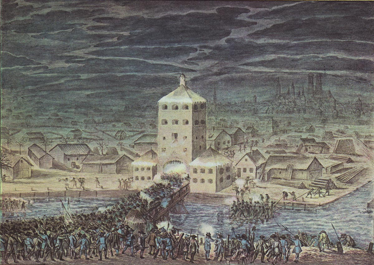 Die Oberländischen Bauern erstürmen die Isarbrücke und den Roten Turm in der Christnacht 1705. Kolerierte Litographie